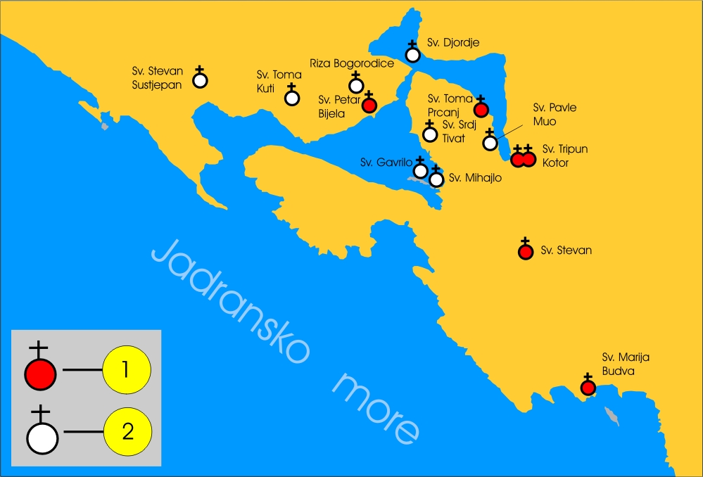 Preromanske crkvene građevine u Boki Kotorskoj: 1. Spomenici iz IX vijeka ; 2. Spomenici iz X - XI vijeka.